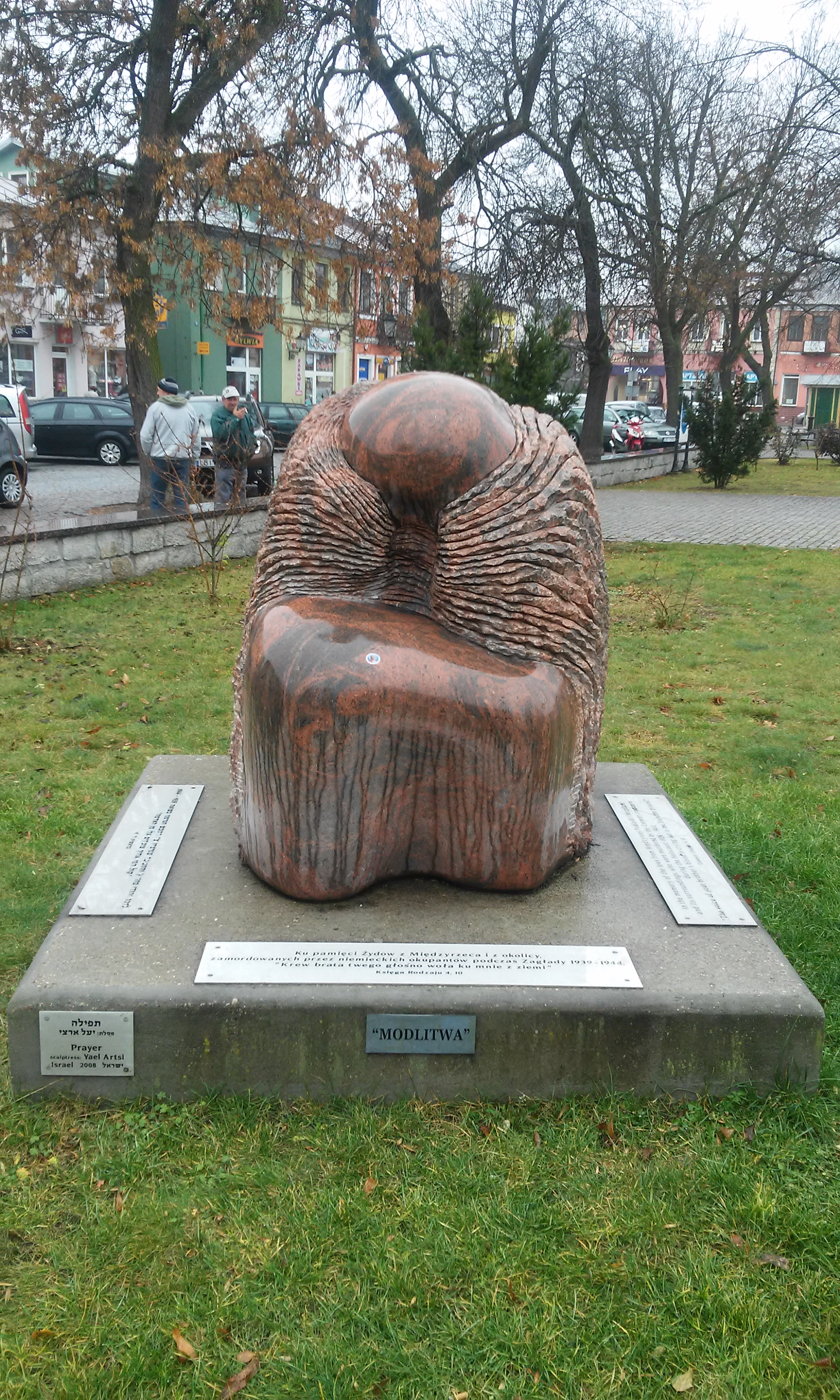 Pomnik "Modlitwa" upamiętniający zniszczoną podczas Holokaustu społeczność Żydów międzyrzeckich